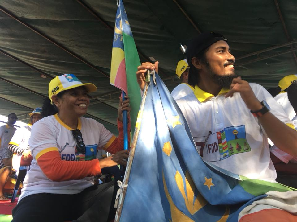 UDT-Mitglieder bei einer Wahlkampfveranstaltung der FDD in Tasitolu